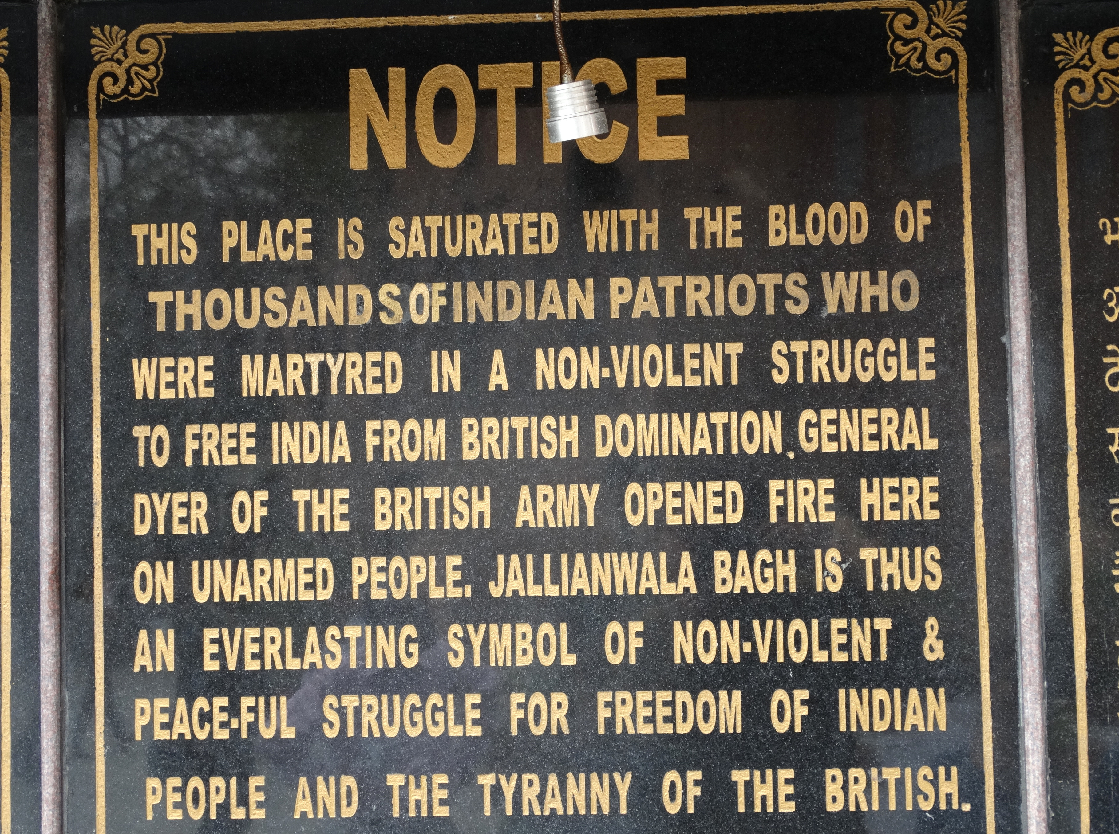 Plaque Memorializing 1919 Amritsar Massacre - Jallianwala Bagh - Amritsar - Punjab - India